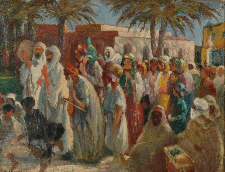 Nicolae Gropeanu (1865 - 1936) - Procesiune în Palestina